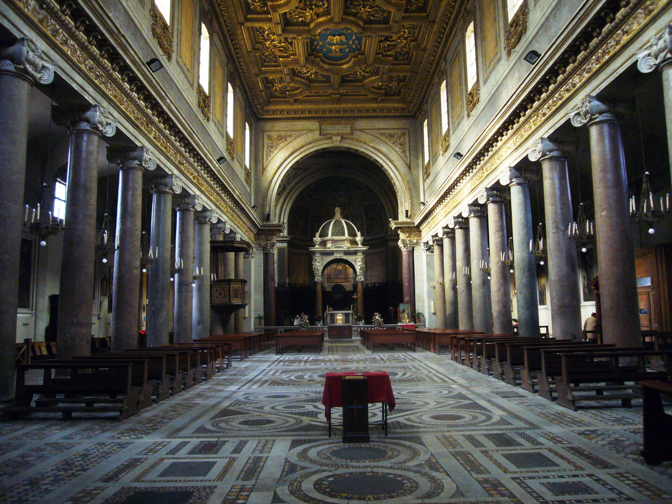 Roma, basilica di San Crisogono in Trastevere: interno